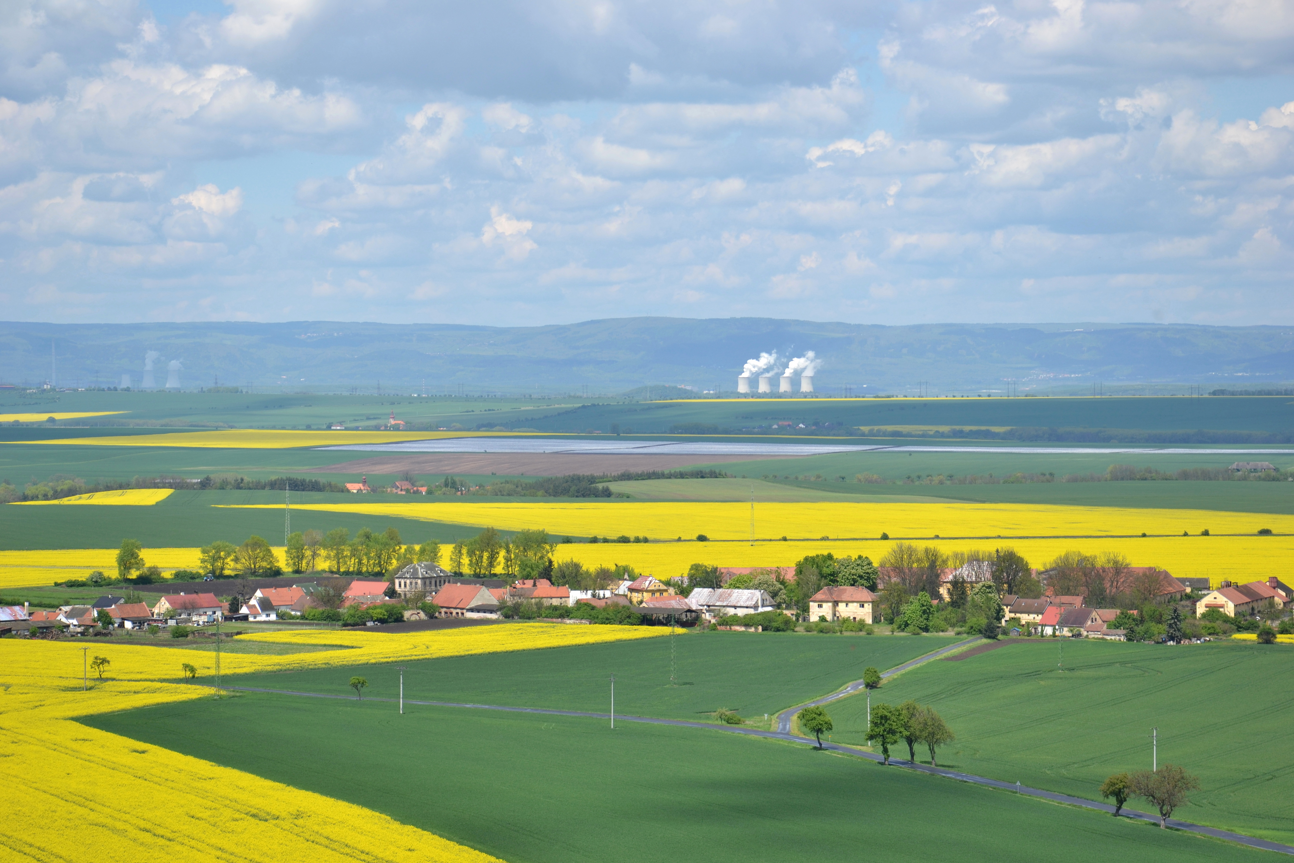 Kaštice – celkový pohled z Rubínu